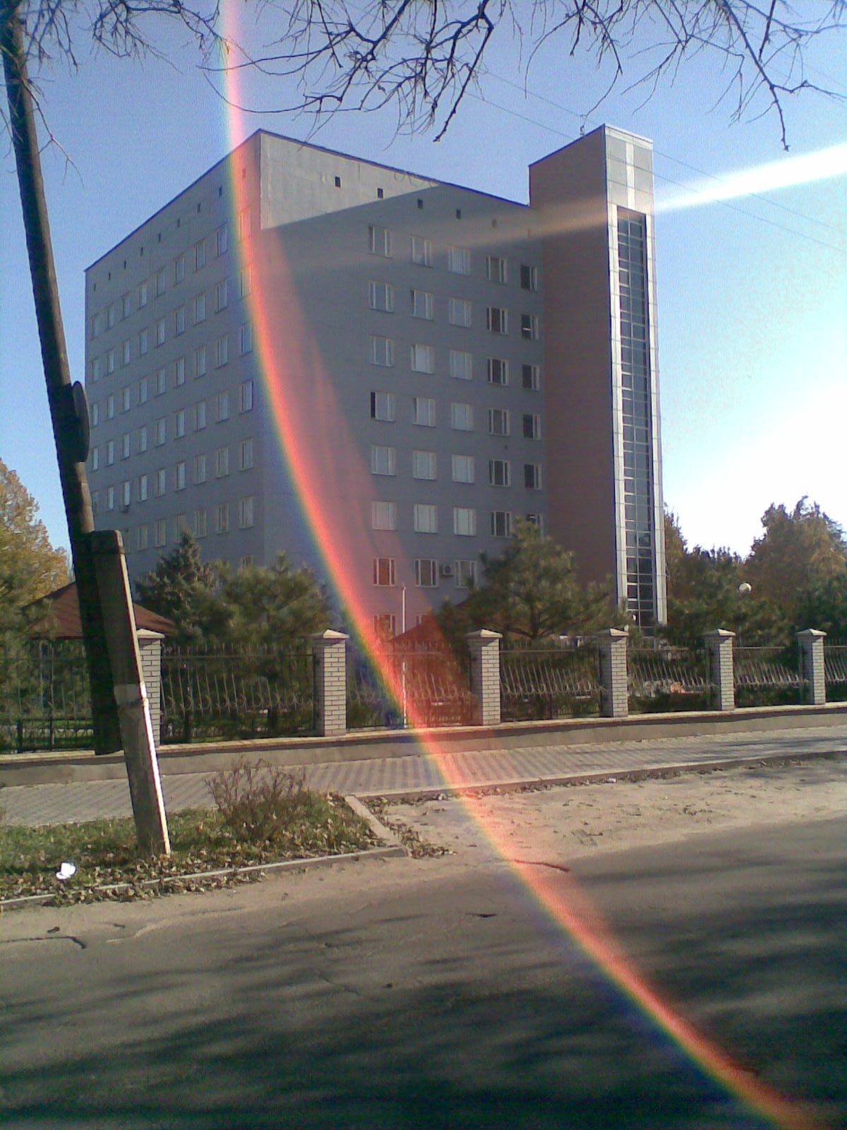 Запорожье. Клиника завода Мотор Сич